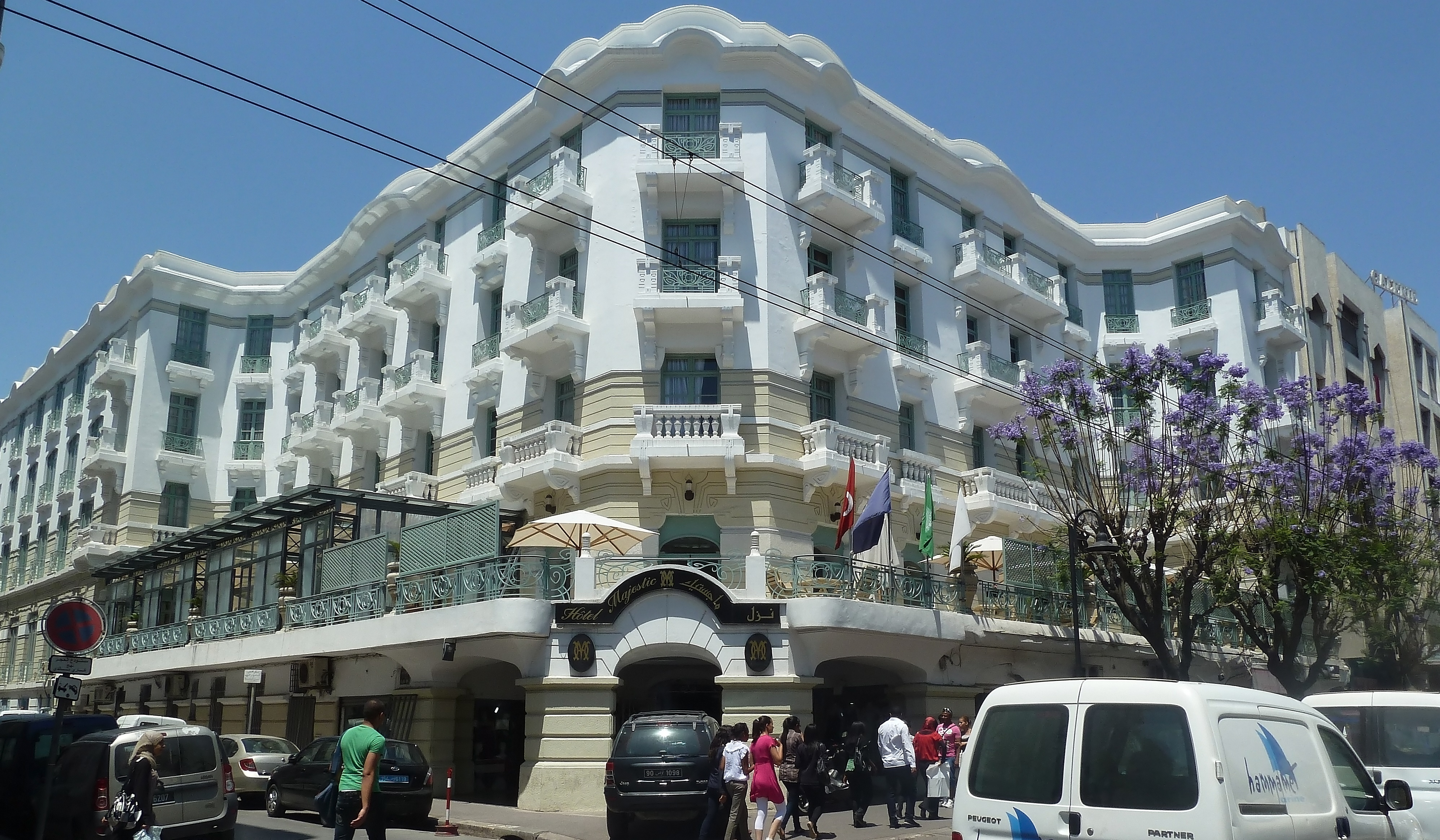 L'hotel Majectic sur l'avenue de Paris à Tunis après le dernier renouvellement du début 2000